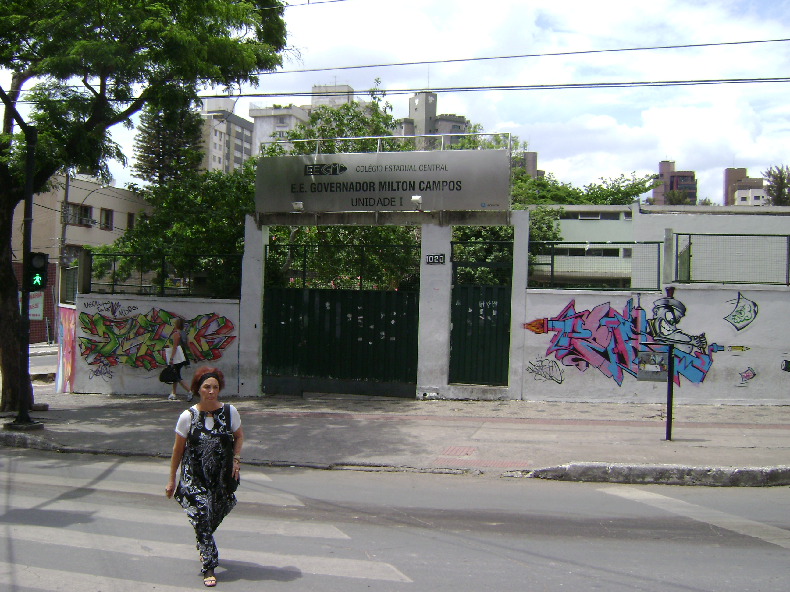 Entrada do colégio Estadual Central, em Belo Horizonte, Brasil.